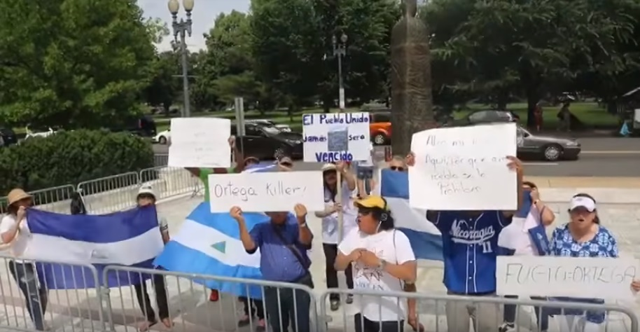 Protesta contra presidente de Nicaragua frente a la sede de la OEA en Washington D.C.